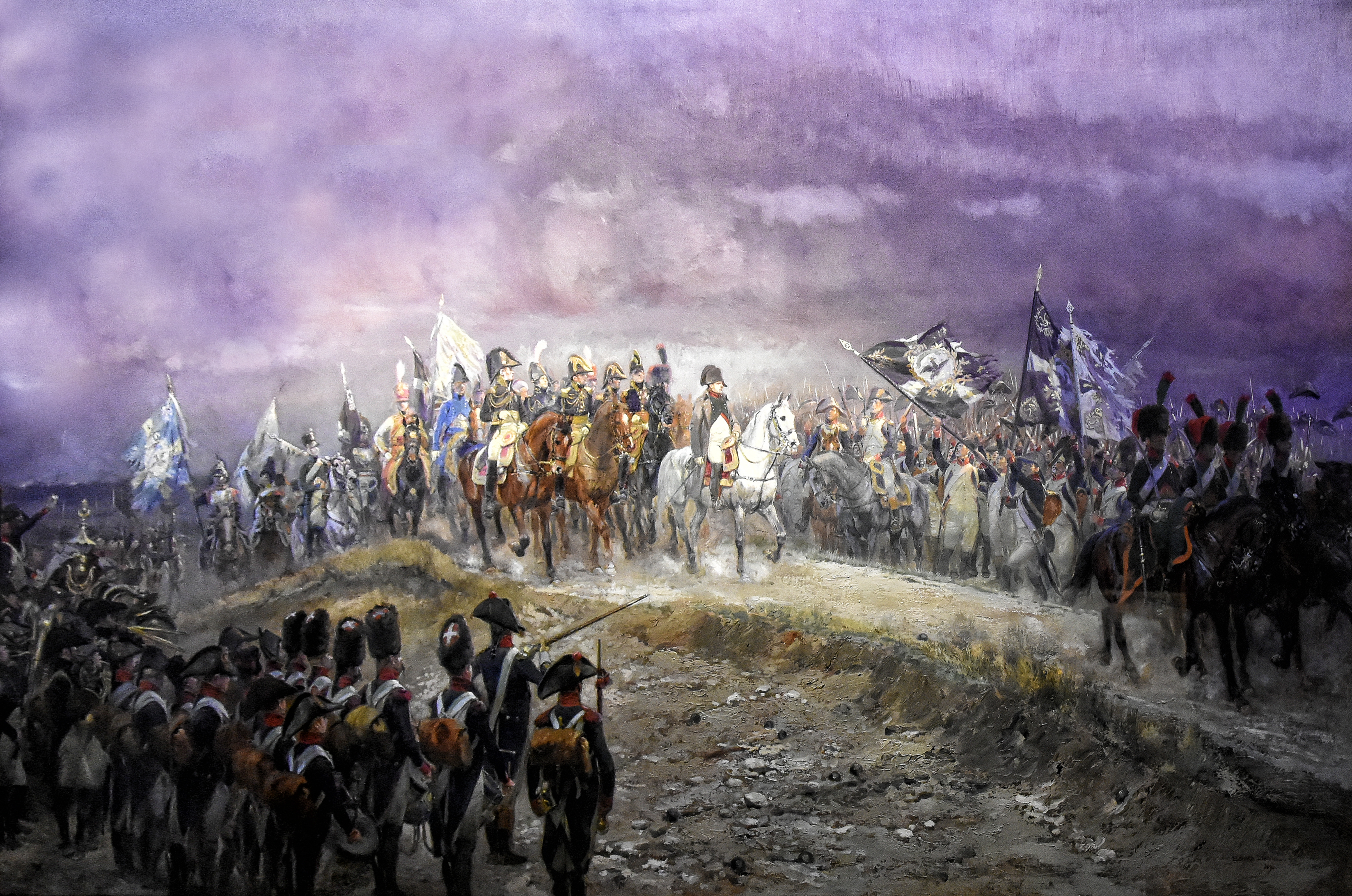 Édouard Detaille (1848-1912) Le Soir d’Iéna, 8 octobre 1806 ou La victoire est à nous - Les Invalides Paris